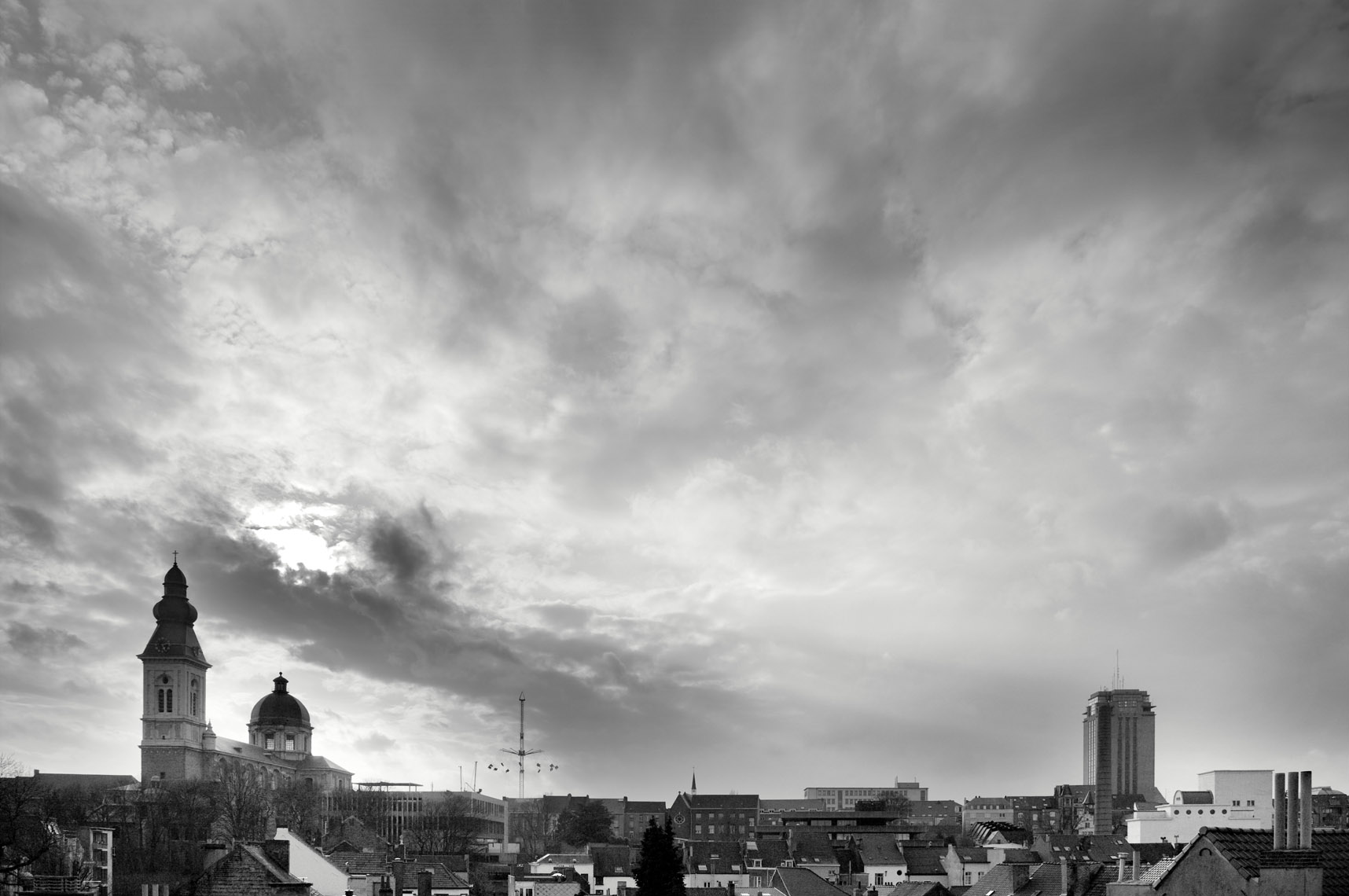 Sint-Pieterskerk en Boekentoren U Gent gezien vanuit de Hofstraat nr. 341, vier hoog.